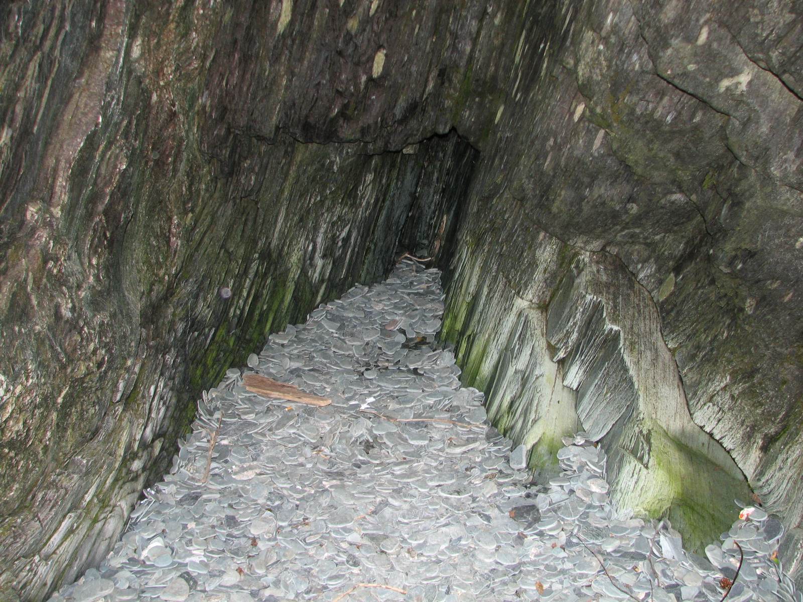 гроты Телецкого озера